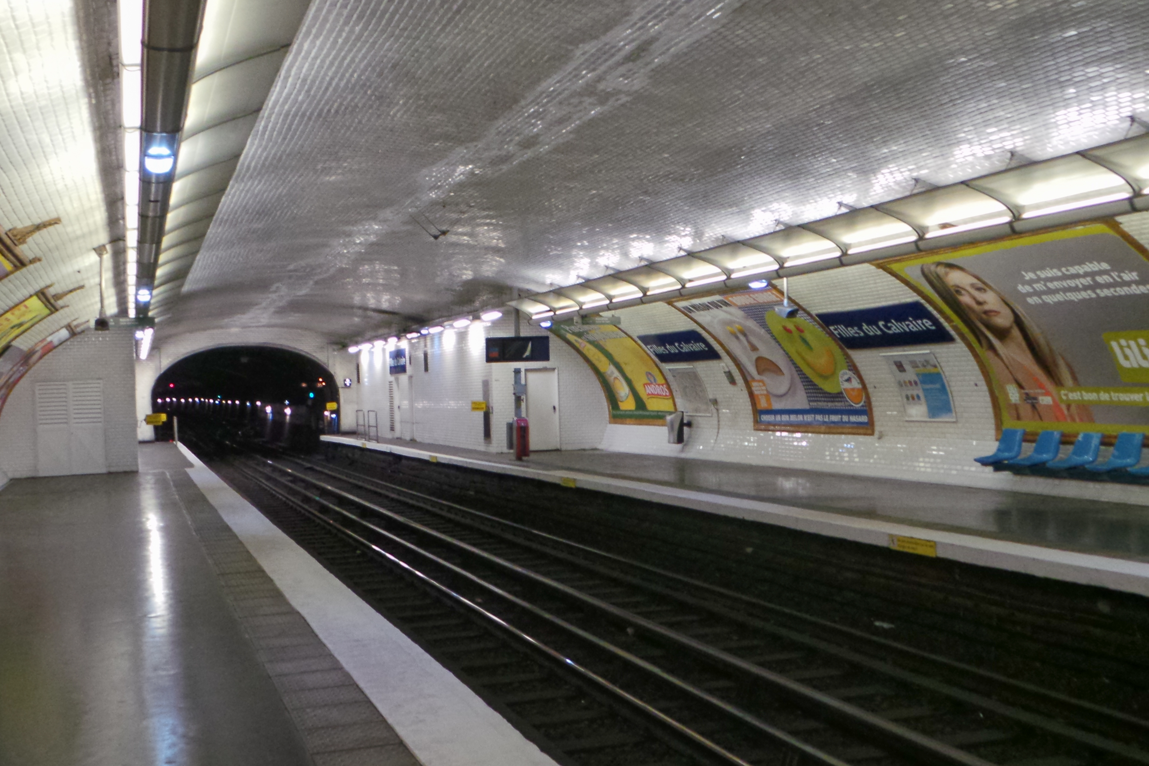 Station de métro Filles du Calvaire, métro de Paris ligne 8, Paris, France